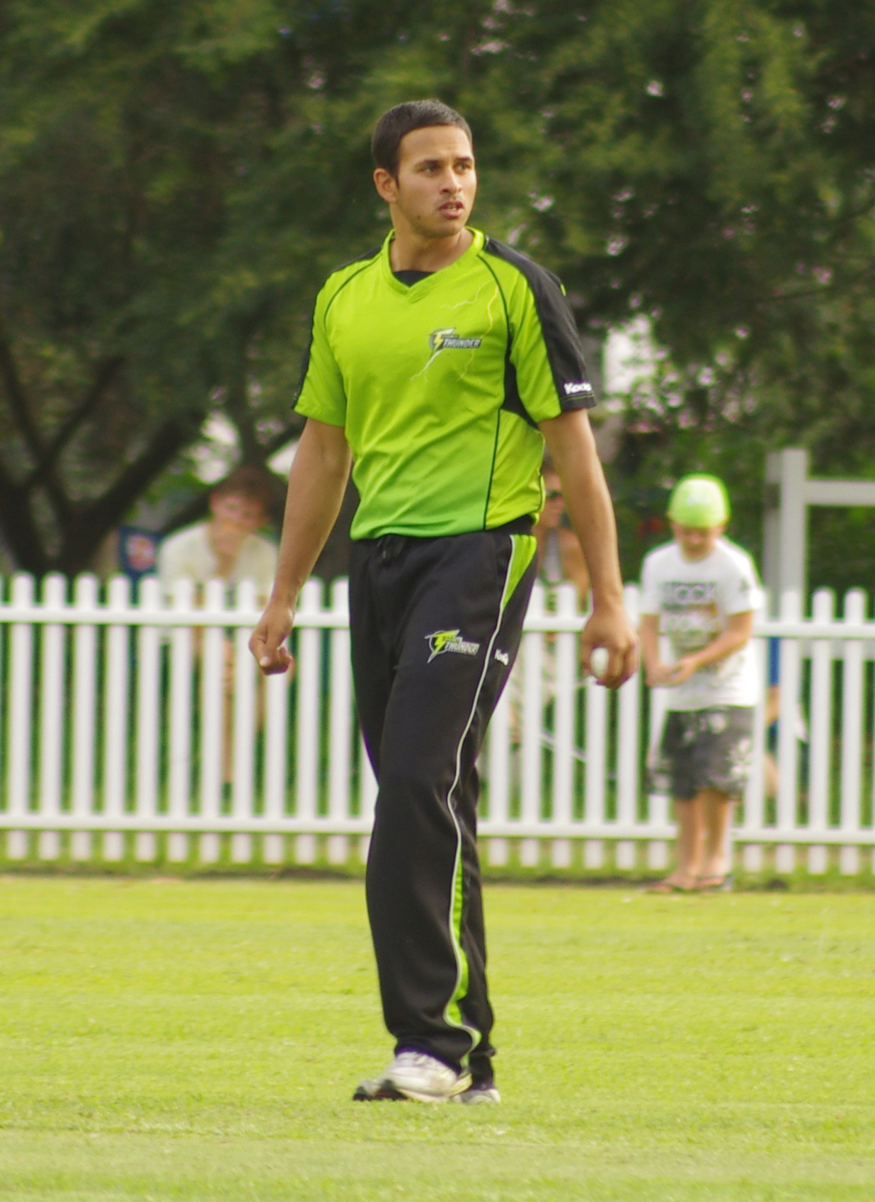 Usman khawaja